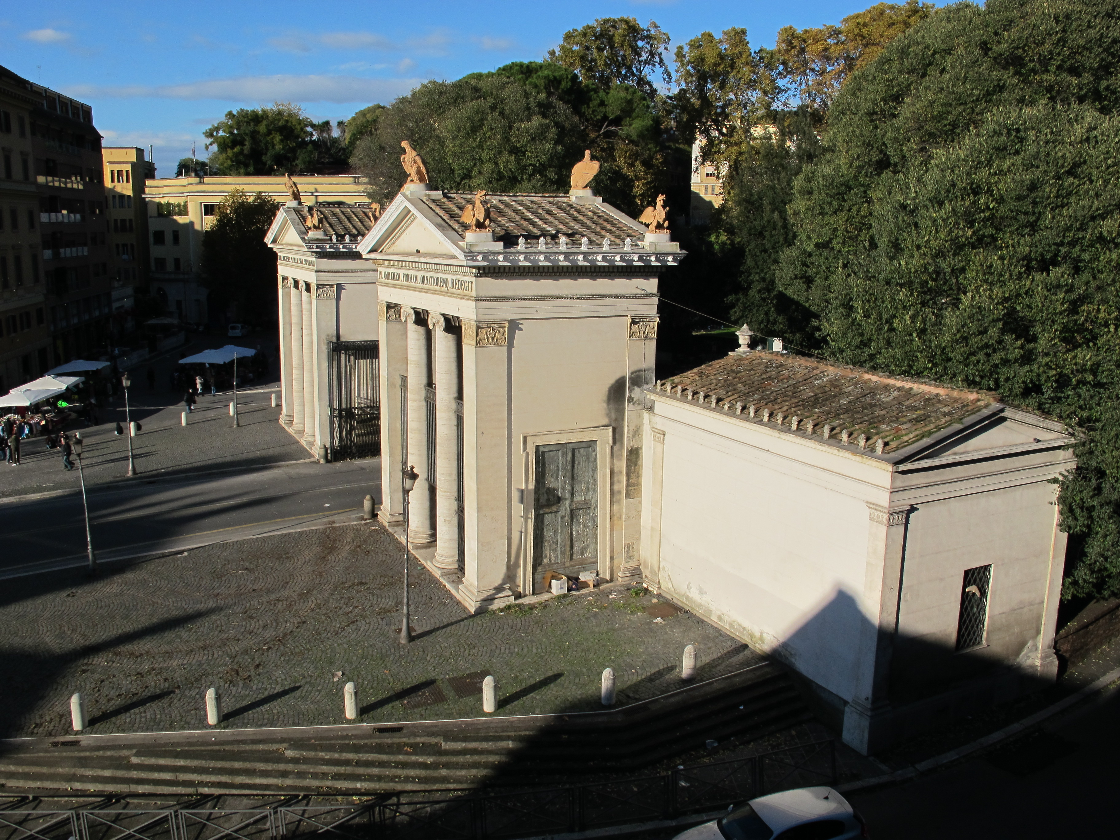 Roma, vedi titolo